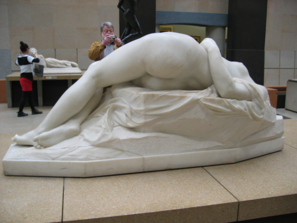 La jeune Tarentine, statue en marbre d'Alexandre Schoenewerk, 1871 d'après un poème d'André Chenier, Musée d'Orsay de Paris